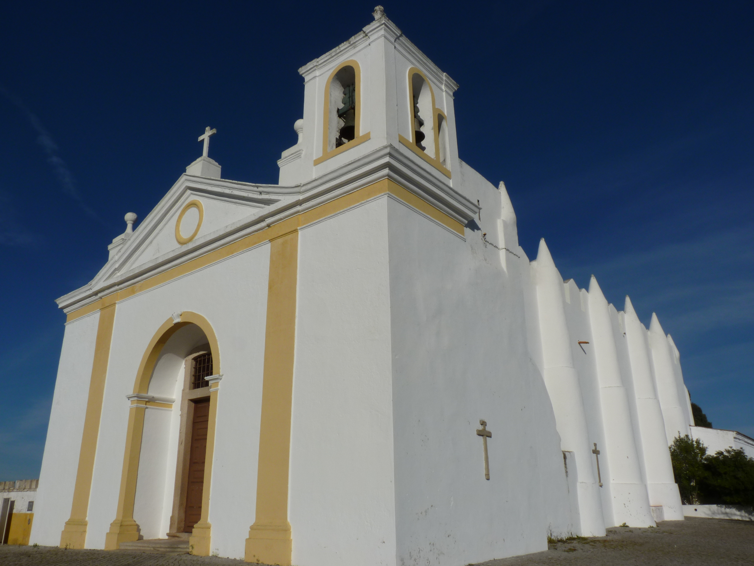 Igreja Matriz de Pavia This file was uploaded for Wiki Loves Monuments in Portugal with the unique identifier 70423.